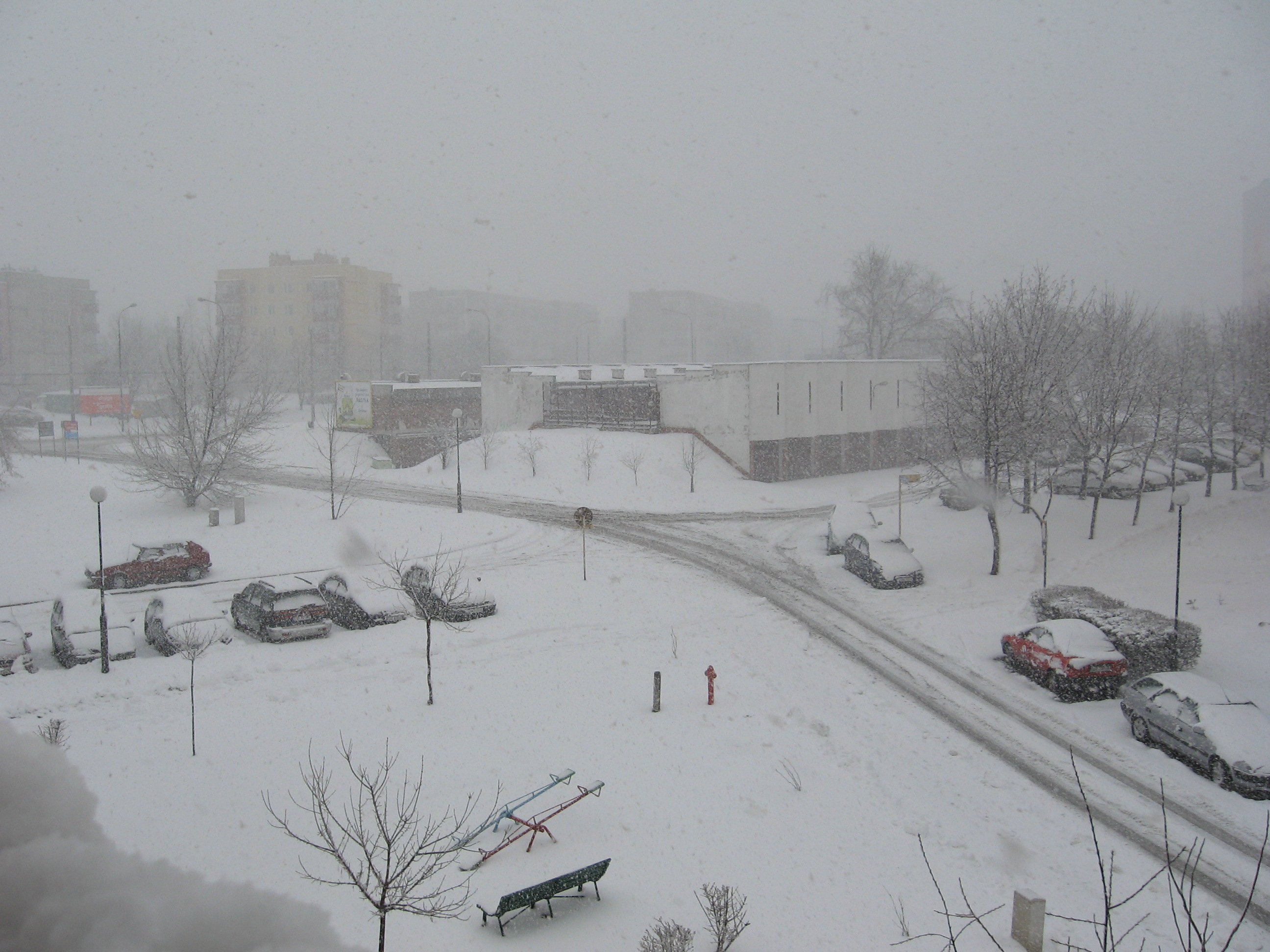 Osiedle Łęgi - zima